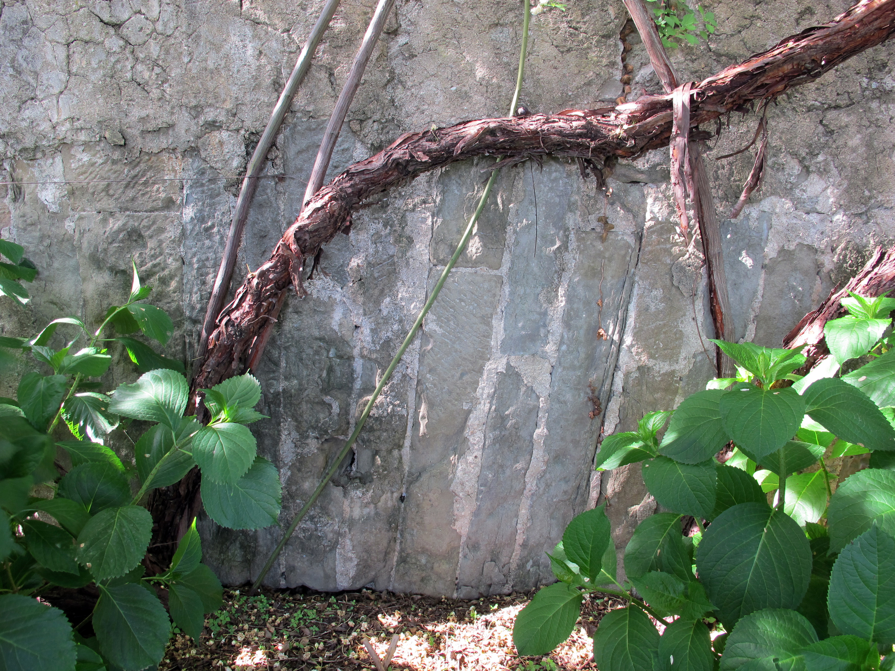 Villa medici di belcanto, discesa lungo il muro di contenimento della prima terrazza 06 imposta di un arco del tempo di giovanni de' medici